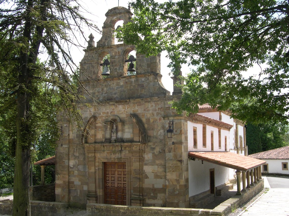 Ilesia'l carbayu ciañu Llangréu Asturies